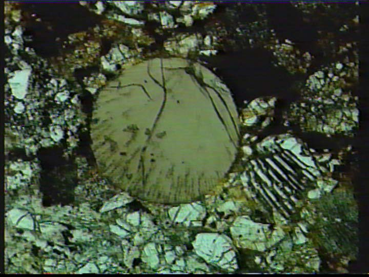 Uveges kondrum képe a vékonycsiszolatban